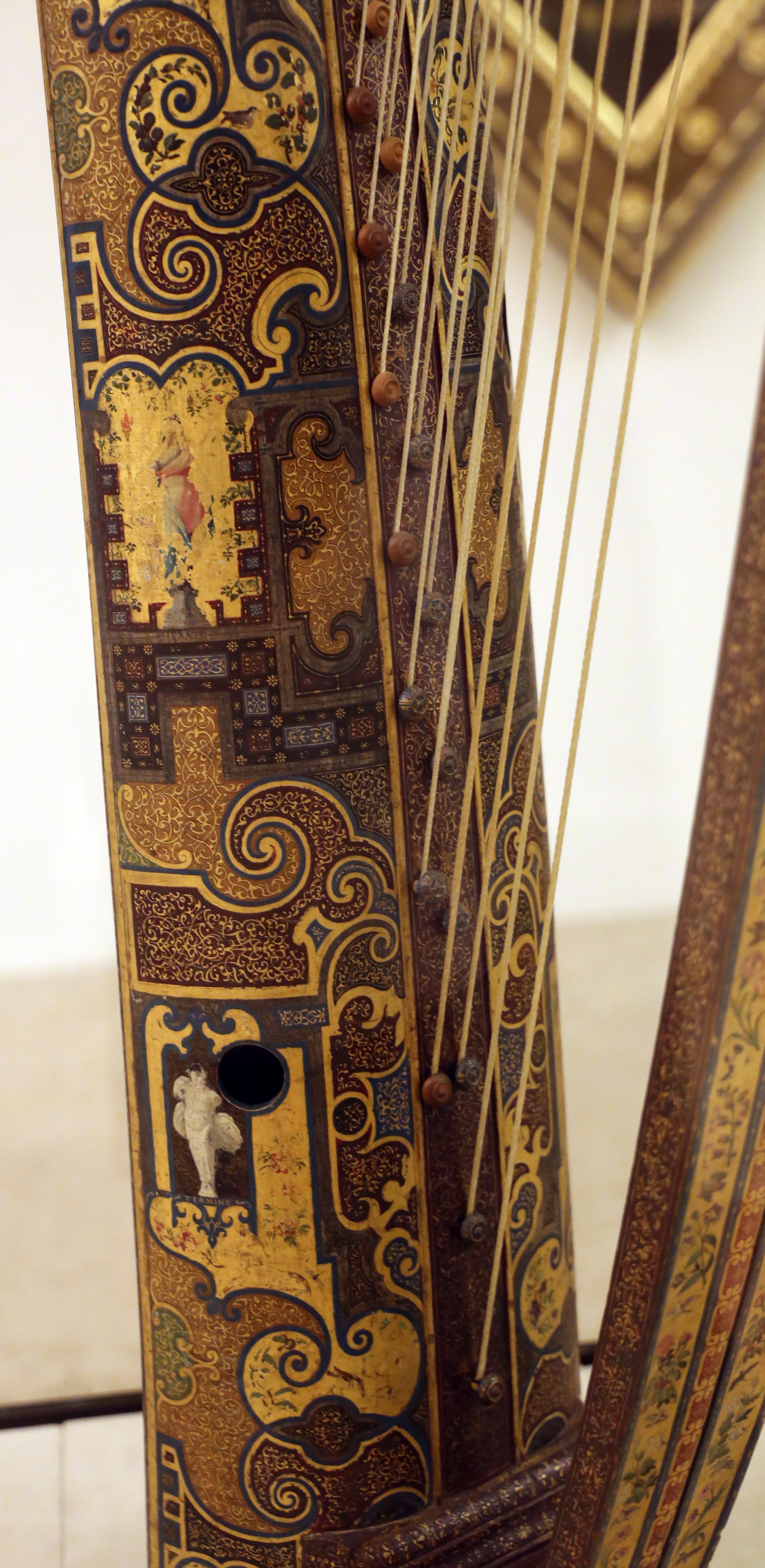 Cerchia di Giovan Battista Giacomelli, decorazioni di Giulio Marescotti, Palazzo dei Musei (Modena) This is a photo of a monument which is part of cultural heritage of Italy.